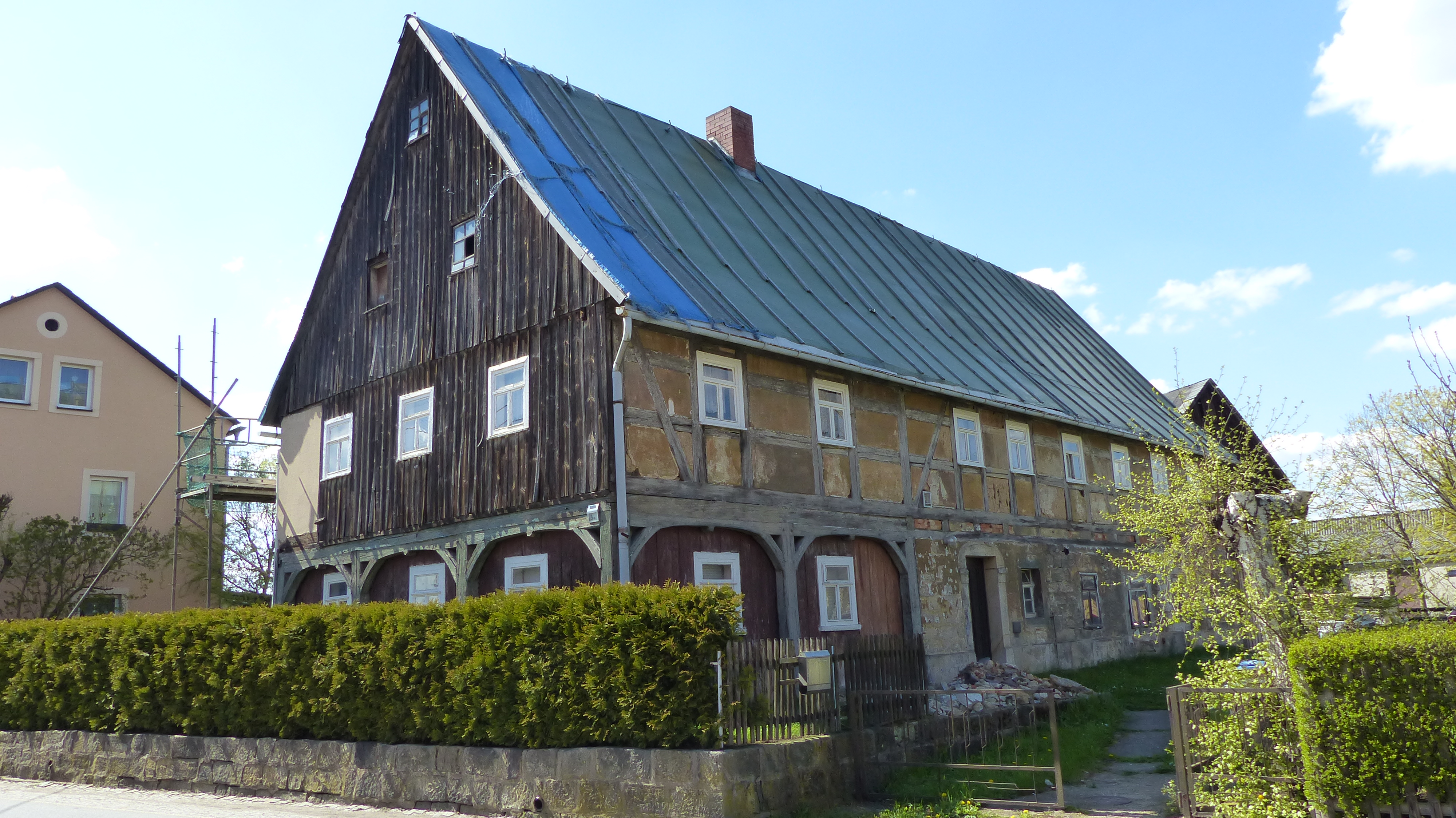 Denkmalgeschütztes Umgebindehaus, Sebnitzer Straße 5a, Altendorf (Sebnitz)